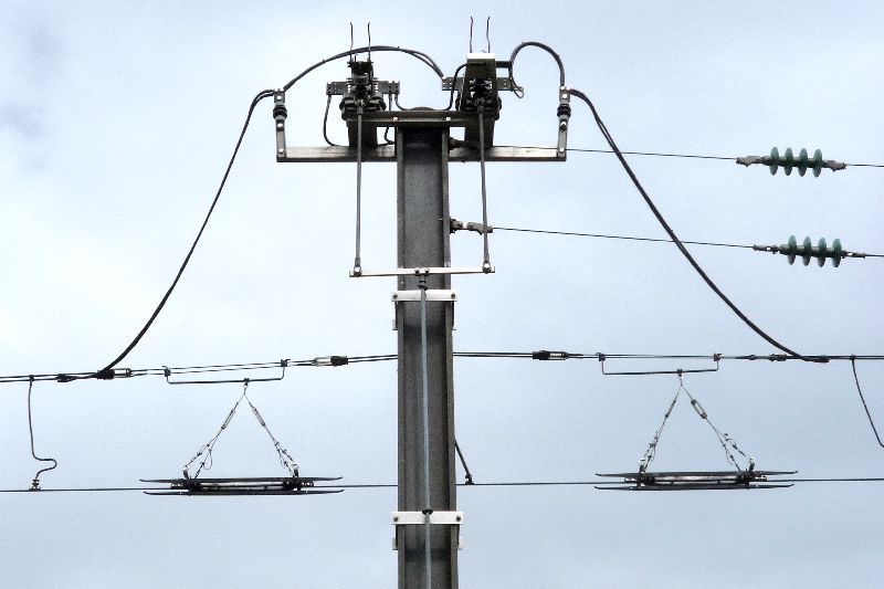 Systemtrennstelle der Saarbahn in Brebach: Übergang vom 750-V-Gleichstromnetz (links) in stromlosen Abschnitt (rechts)